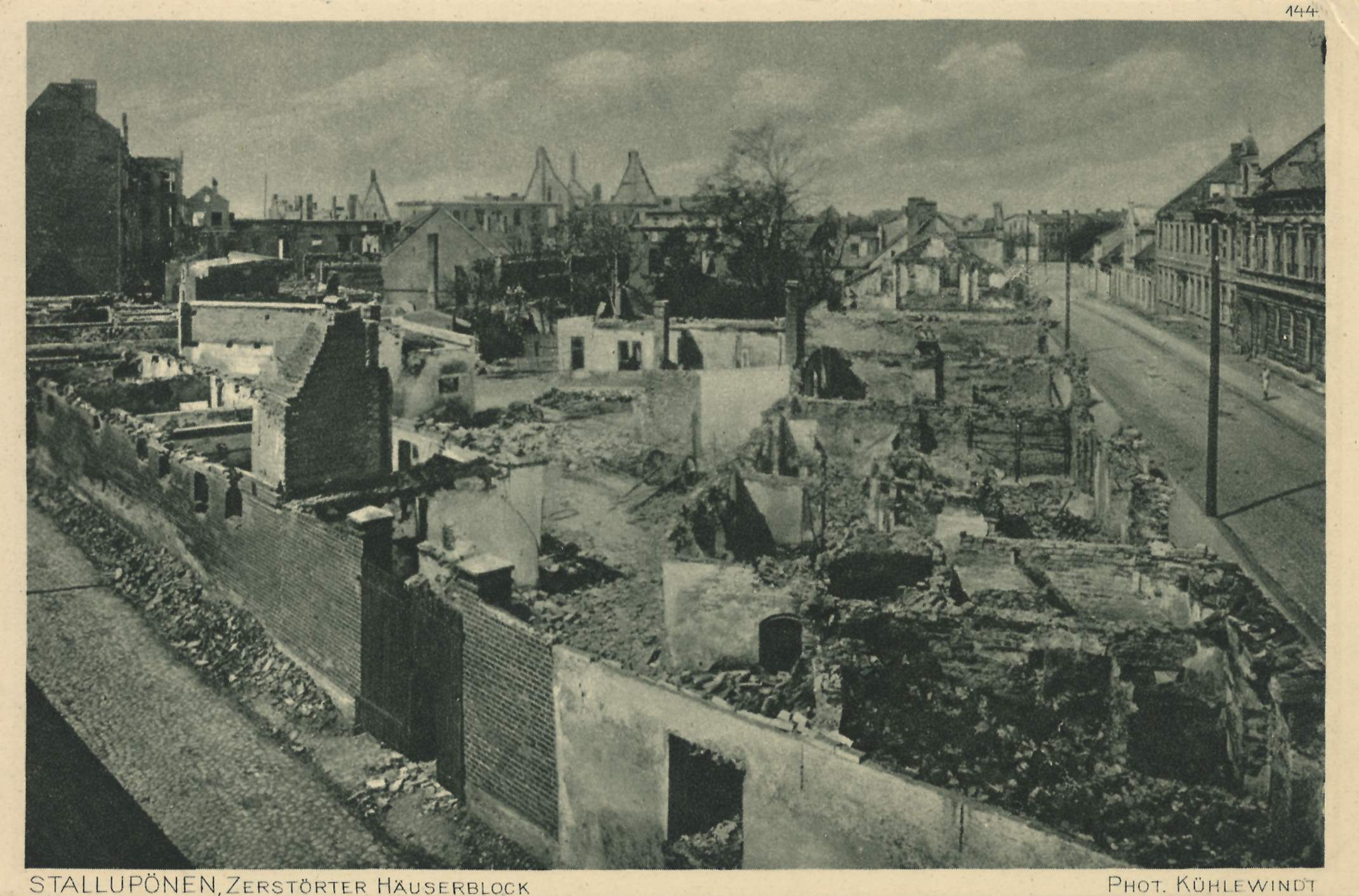 Ruinen